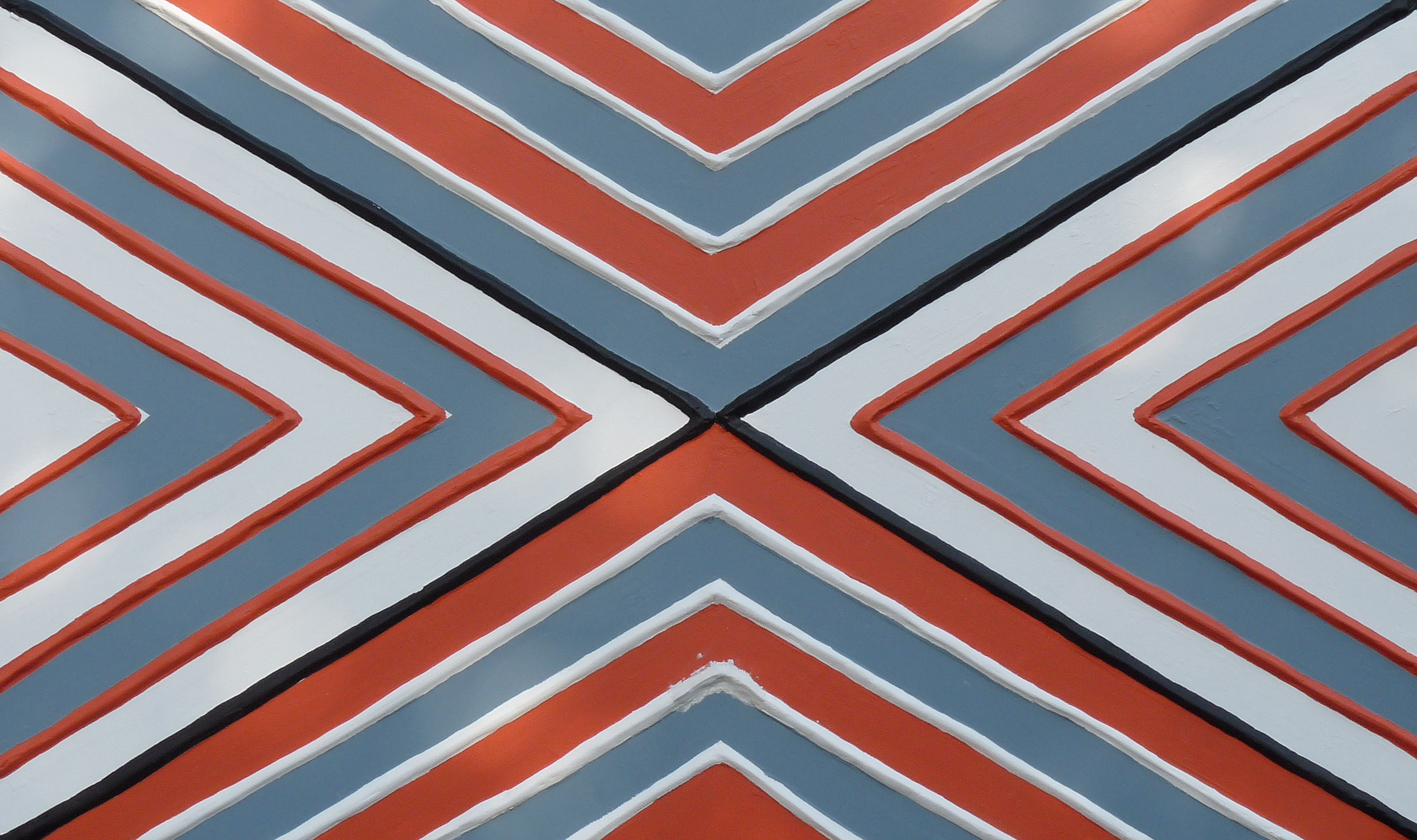 Motifs géométriques traditionnels de l'art Imigongo, né à la fin du 18e s. dans la province de Kibungo (Rwanda). Panneaux installés à Saint-Dié-des-Vosges dans le cadre du 22e Festival international de géographie où le Rwanda était le pays invité.